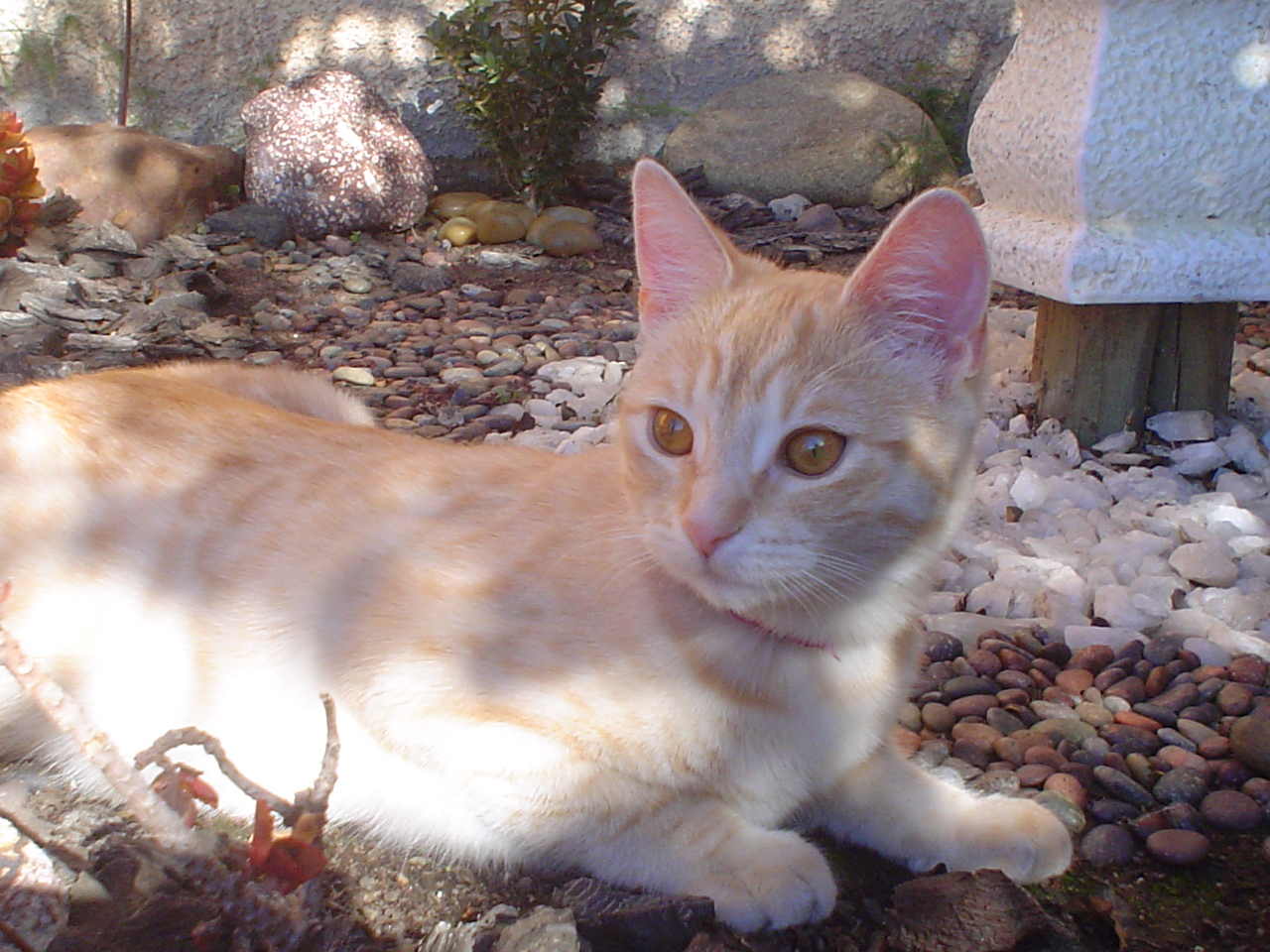 Gata en descanso